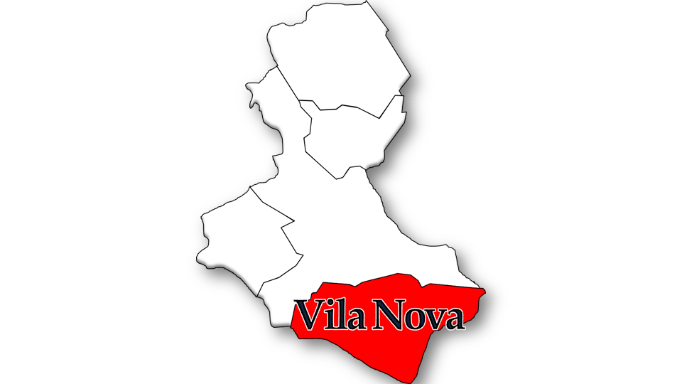 População